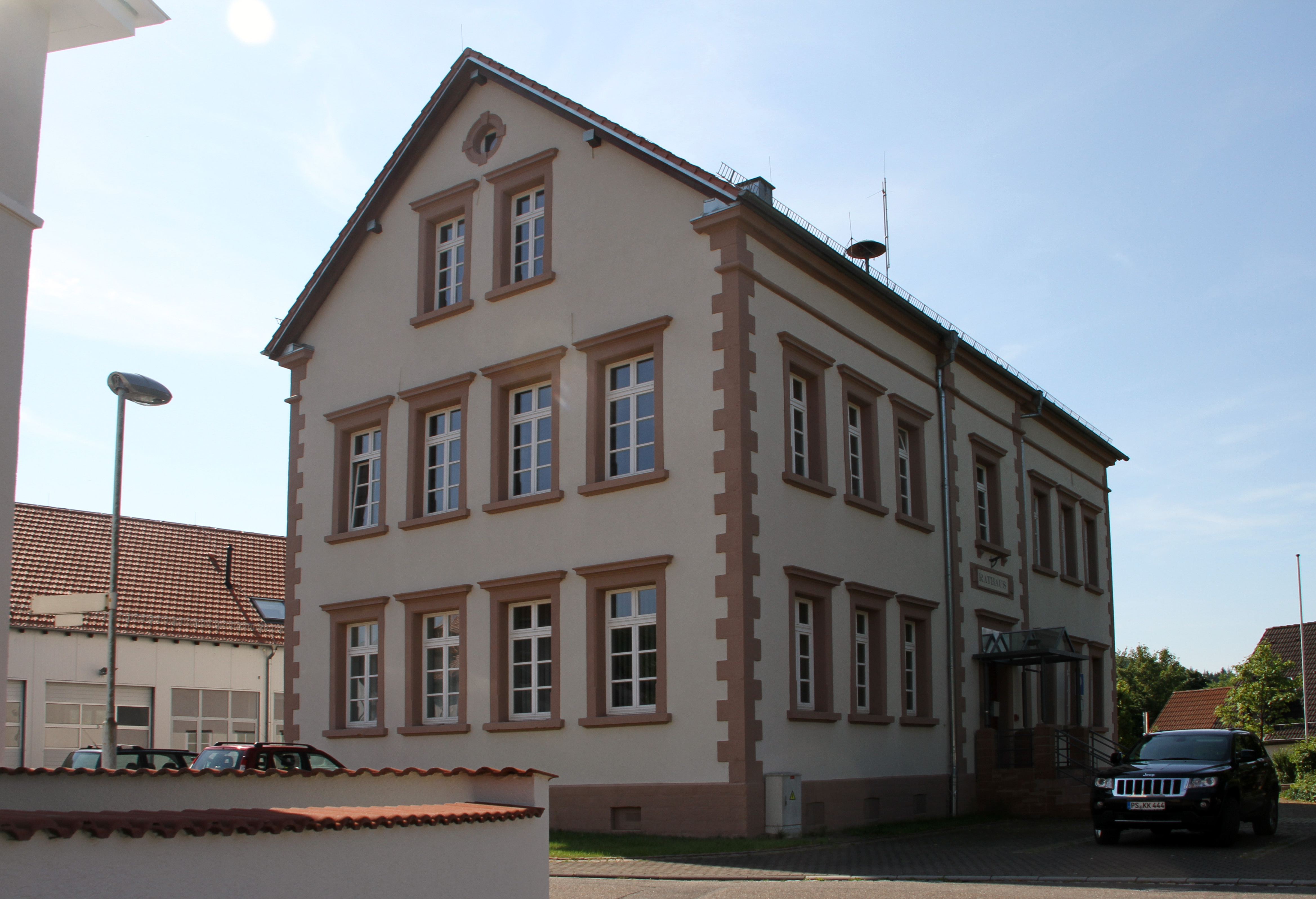 Münchweiler an der Rodalb, Schulstrasse 19, Rathaus; ehemalige Schule; spätklassizistischer Putzbau, wohl aus der zweiten Hälfte des 19. Jahrhunderts.